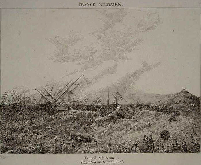 Gravure ancienne: "France militaire. Camp de Sidi Ferruch. Coup de vent du 16 juin 1830."